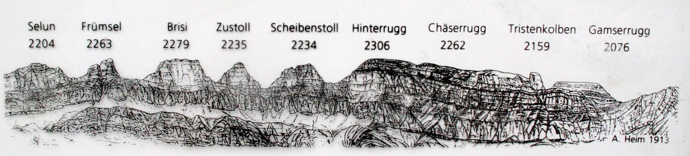 Darstellung der Churfirsten.